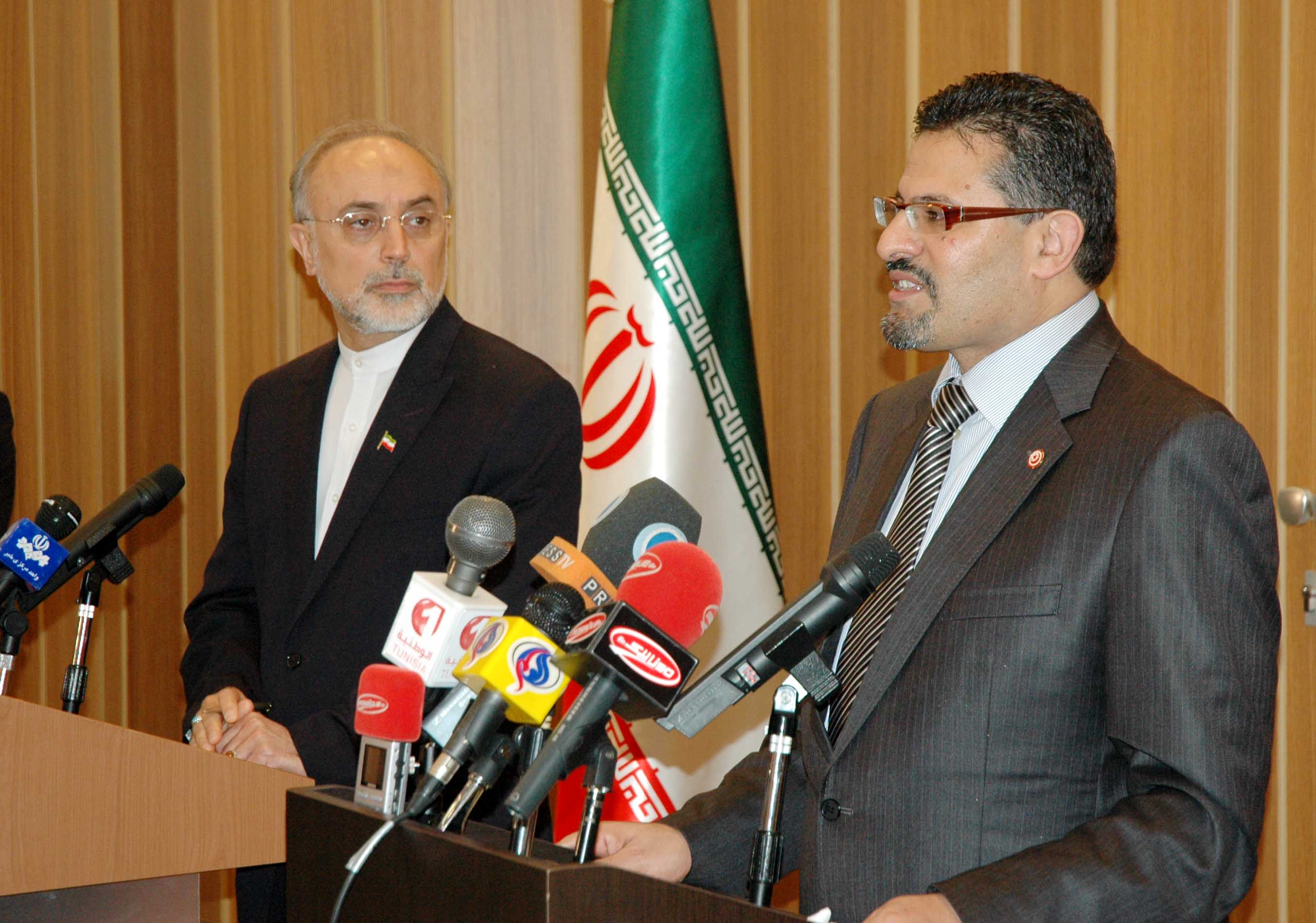 Ali Akbar Salehi, ministre iranien des Affaires étrangères, et Rafik Abdessalem, ministre tunisien des Affaires étrangères, en conférence de presse